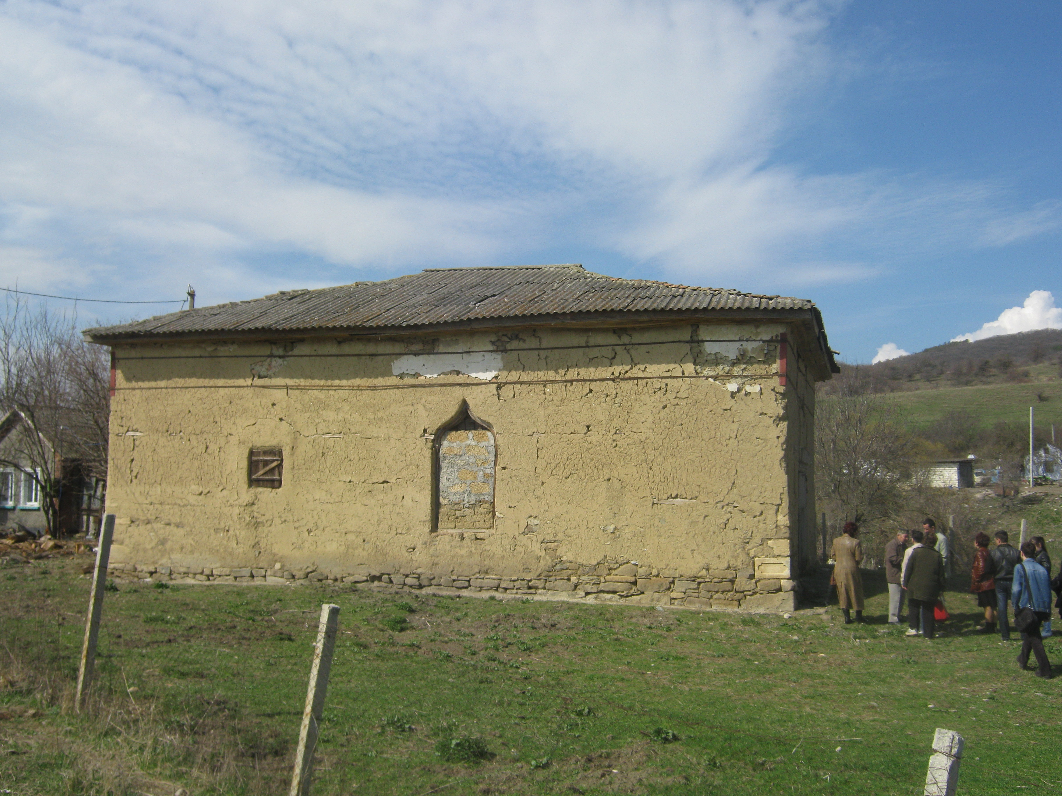 старинная саманная мечеть_село Черемисовка (Копюрли-кой, Крым, Украина).JPG